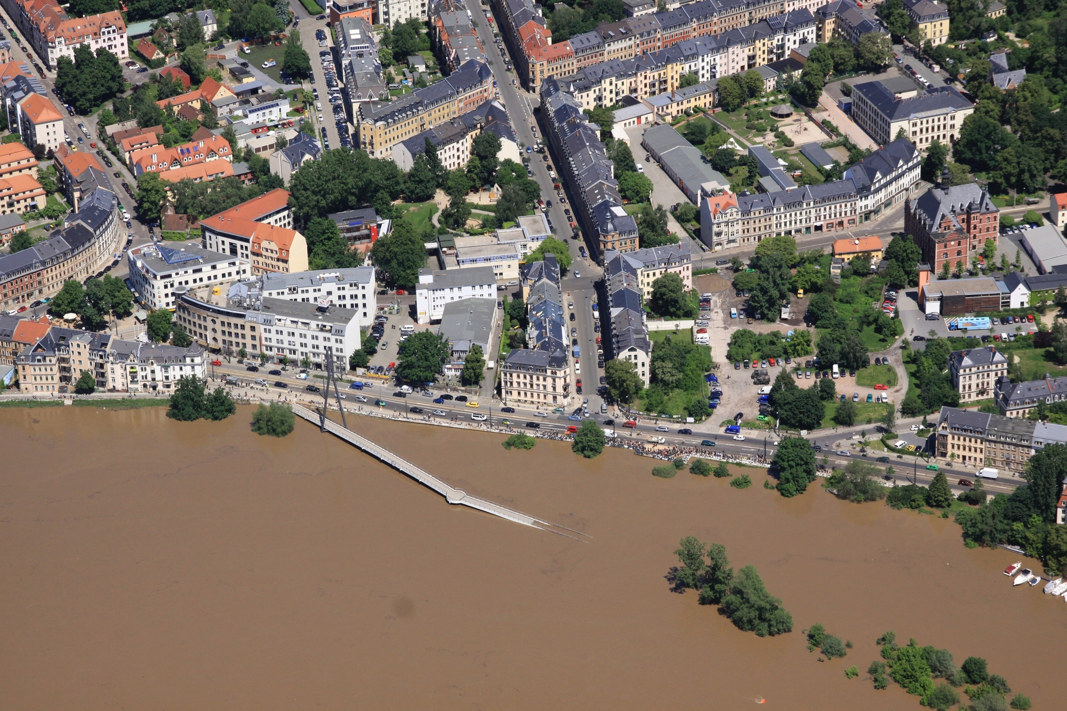 Die Molenbrücke im Pieschner Hafen zur Flut 2013 Vorn am Wasser die Leipziger Straße. Mittig nach Hinten verläuft die Rehefelder Straße. Rechts im Bild das Rathaus Pieschen